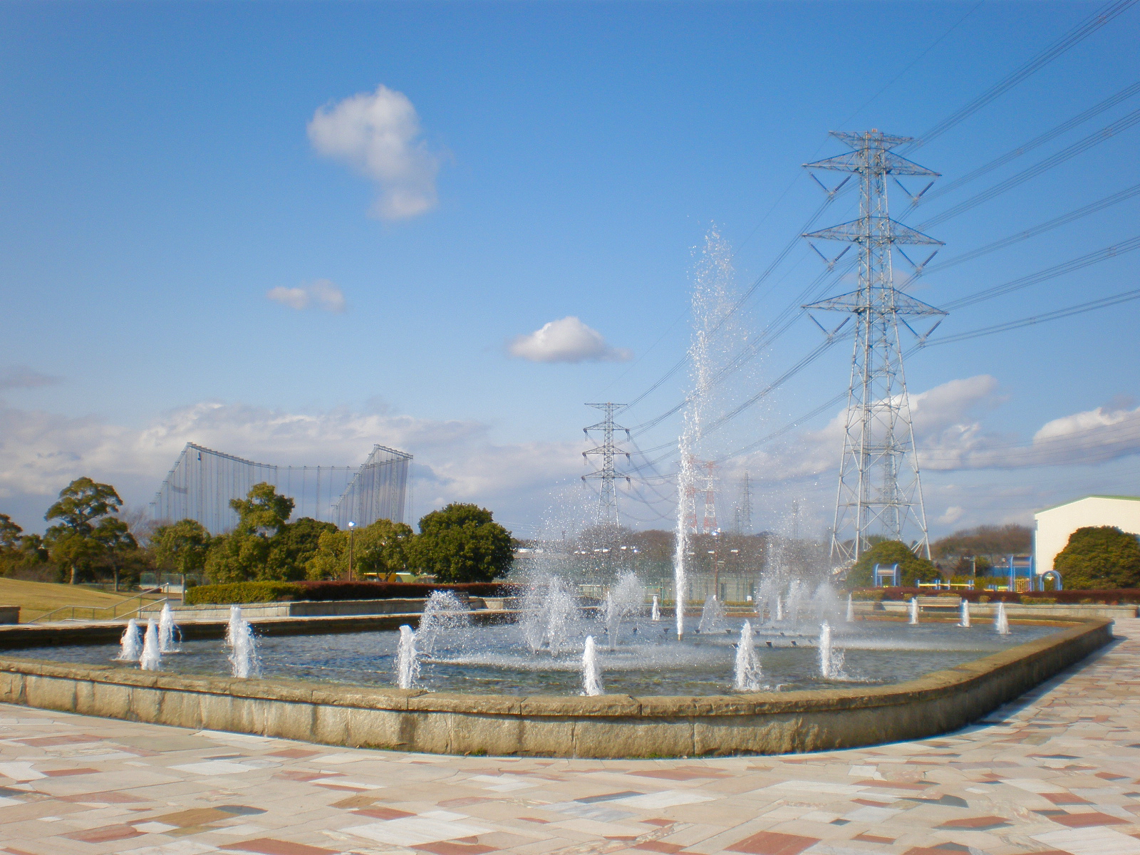 愛知県春日井市の落合公園にある噴水